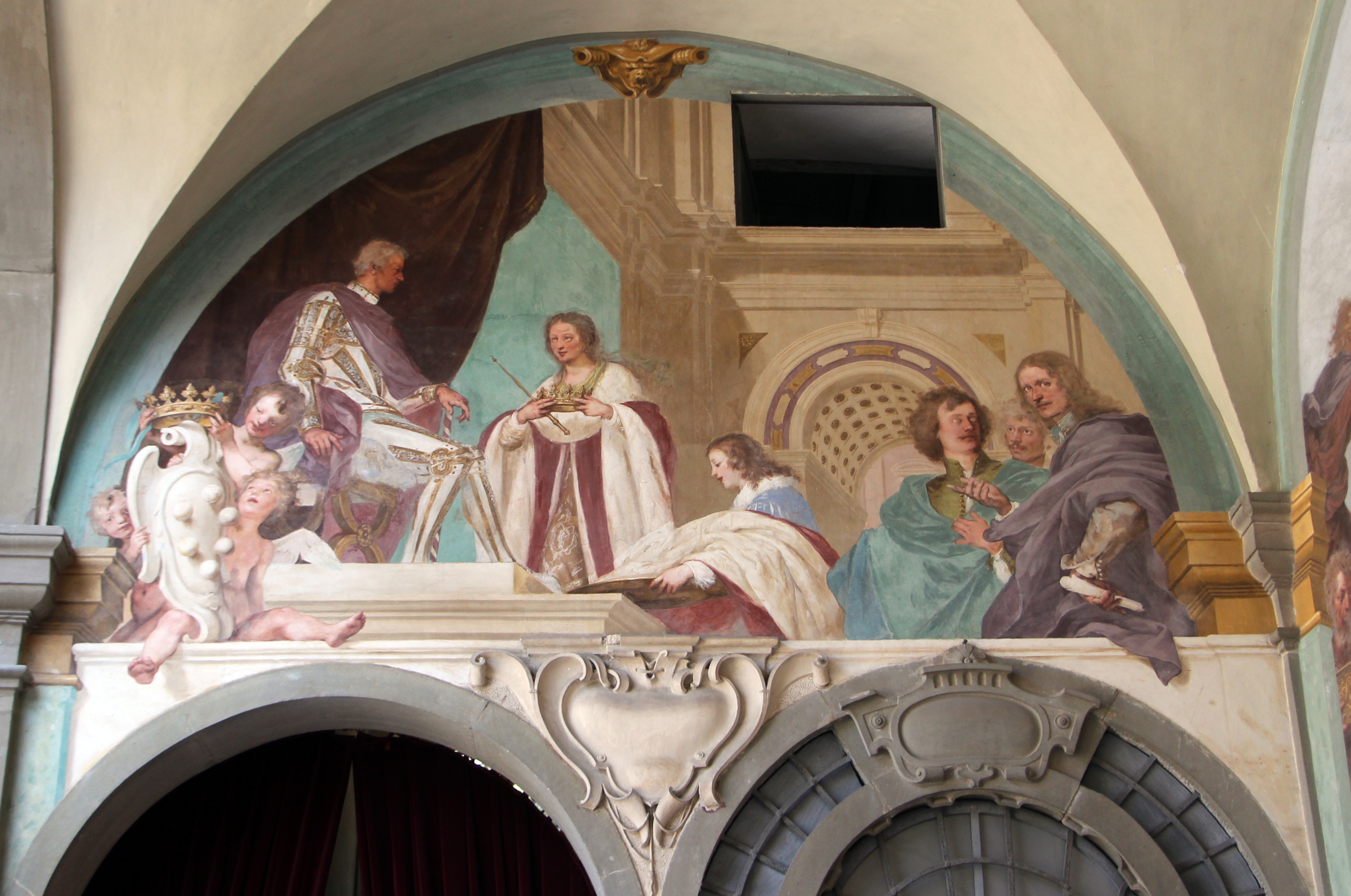 Villa medicea della Petraia - MIBAC The making of this document was supported by Wikimedia CH. (Submit your project!) For all the files concerned, please see the category Supported by Wikimedia CH. This is a photo of a monument which is part of cultural heritage of Italy.